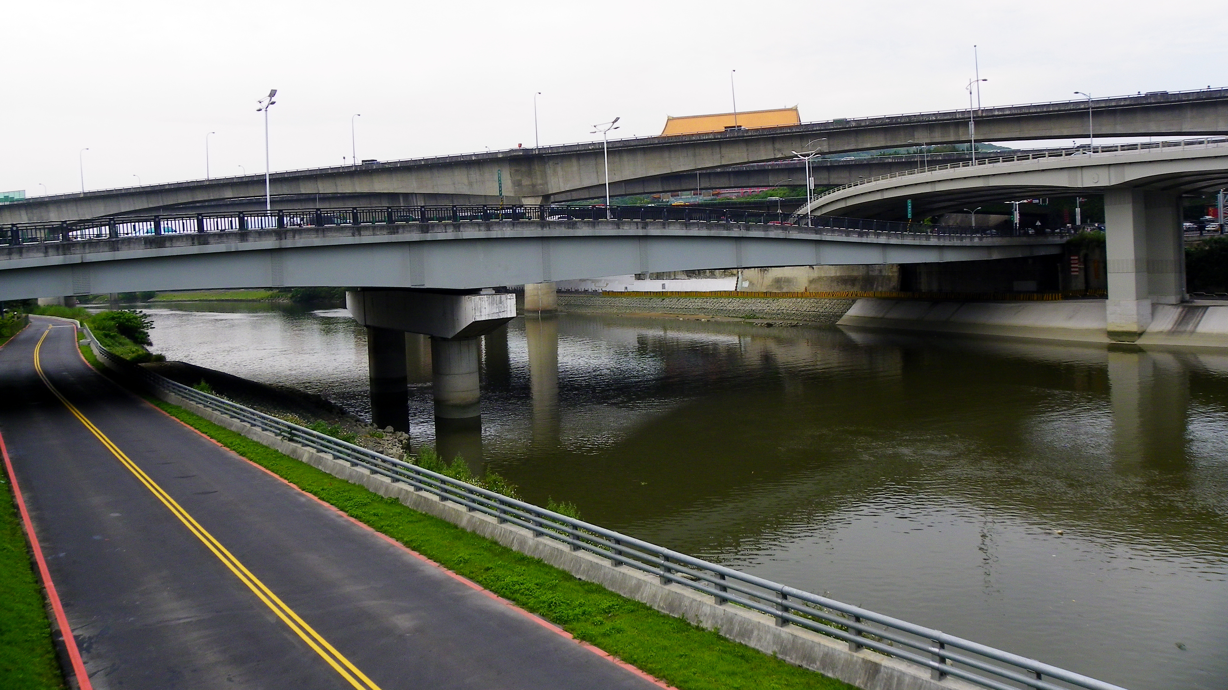 中文（台灣）: 跨越基隆河的中山新橋、新生高架道路與中山高速公路。